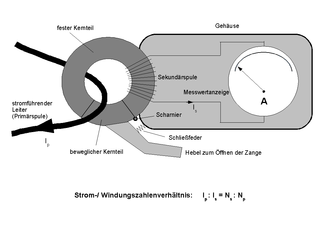 Wechselstrom-Zangenamperemeter